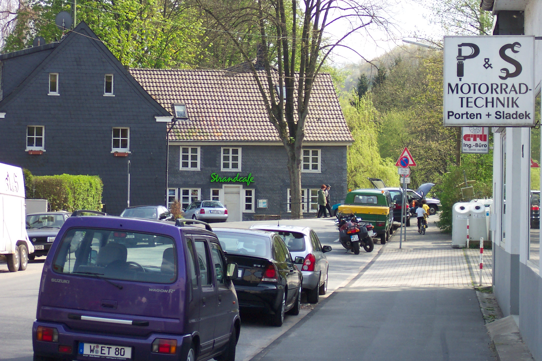 Kohlfurther Brücke, Wuppertal